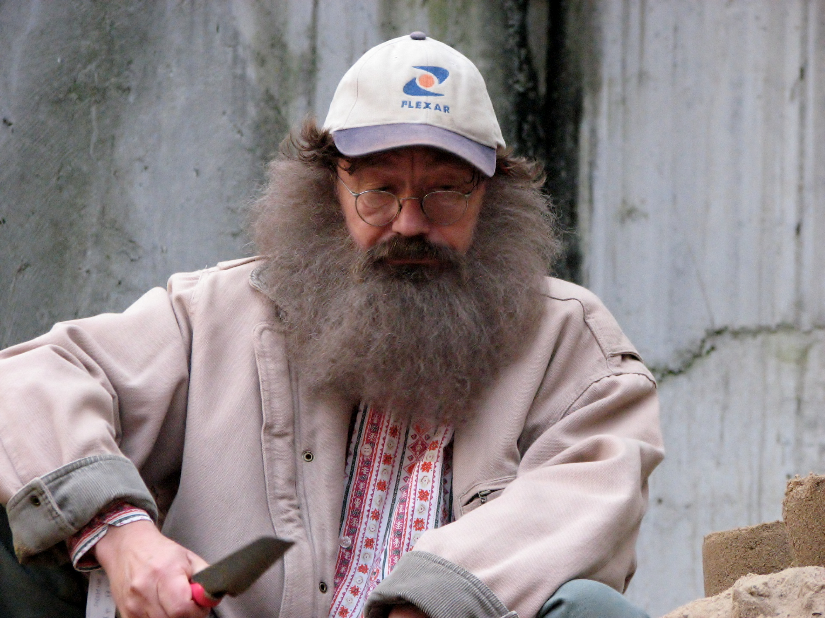 Kalju Orro Tallinna Linnateatri 48. hooaja avamisel